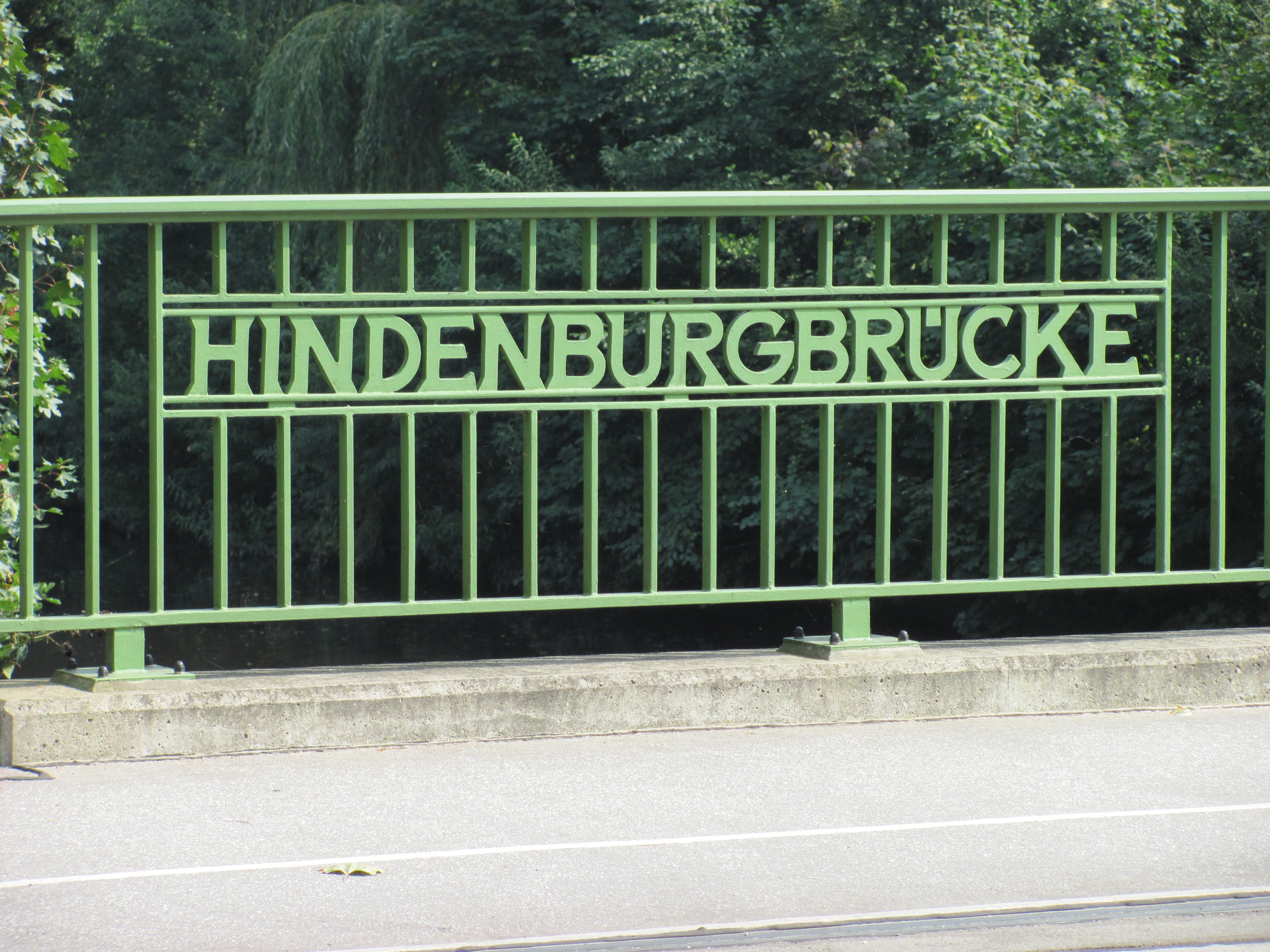 Hindenburgbrücke in Hamburg